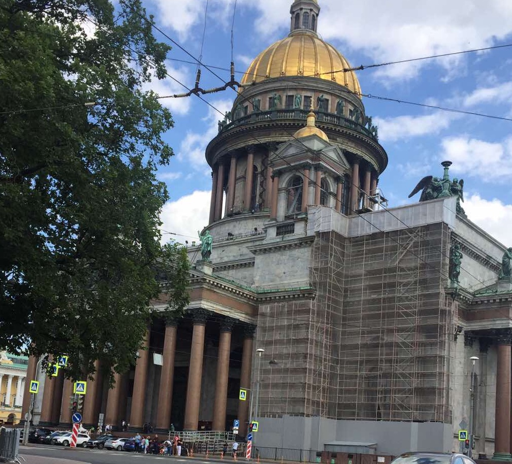 Facade of St. Isaac's Cathedral during renovation